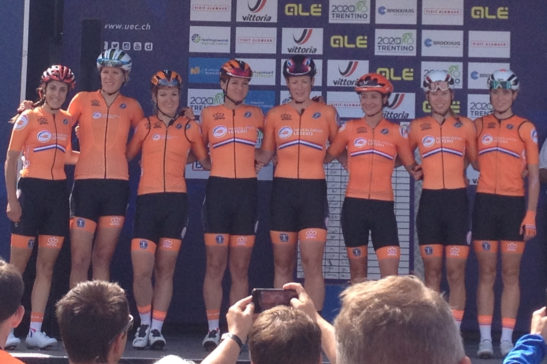 Wegwedstrijd voor vrouwen elite tijdens de Europese kampioenschappen wielrennen in Alkmaar op zaterdag 10 augustus 2019.